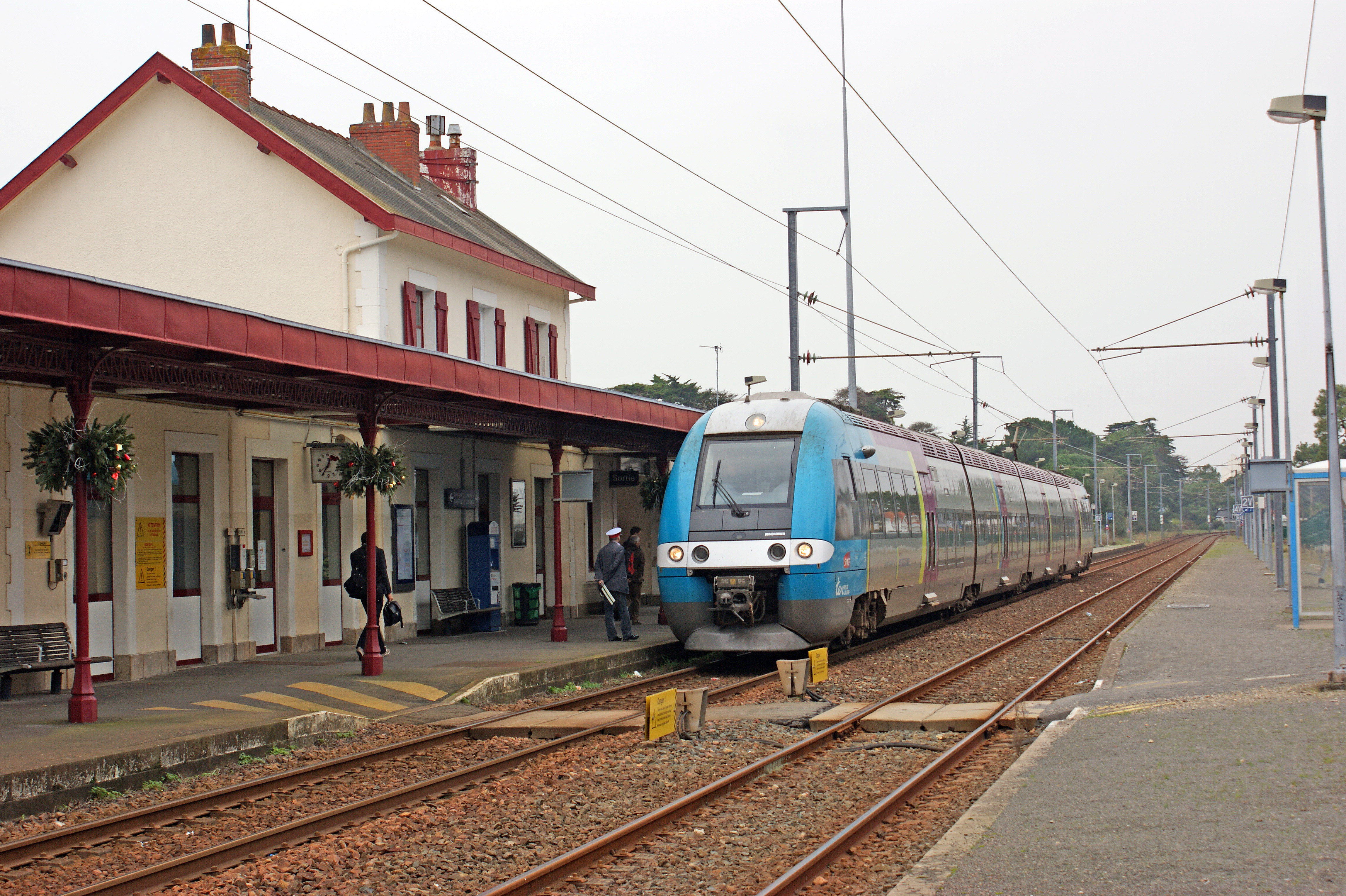 Gare de Pornichet, le passage planchéié et un TER venant de Pornic à quai.